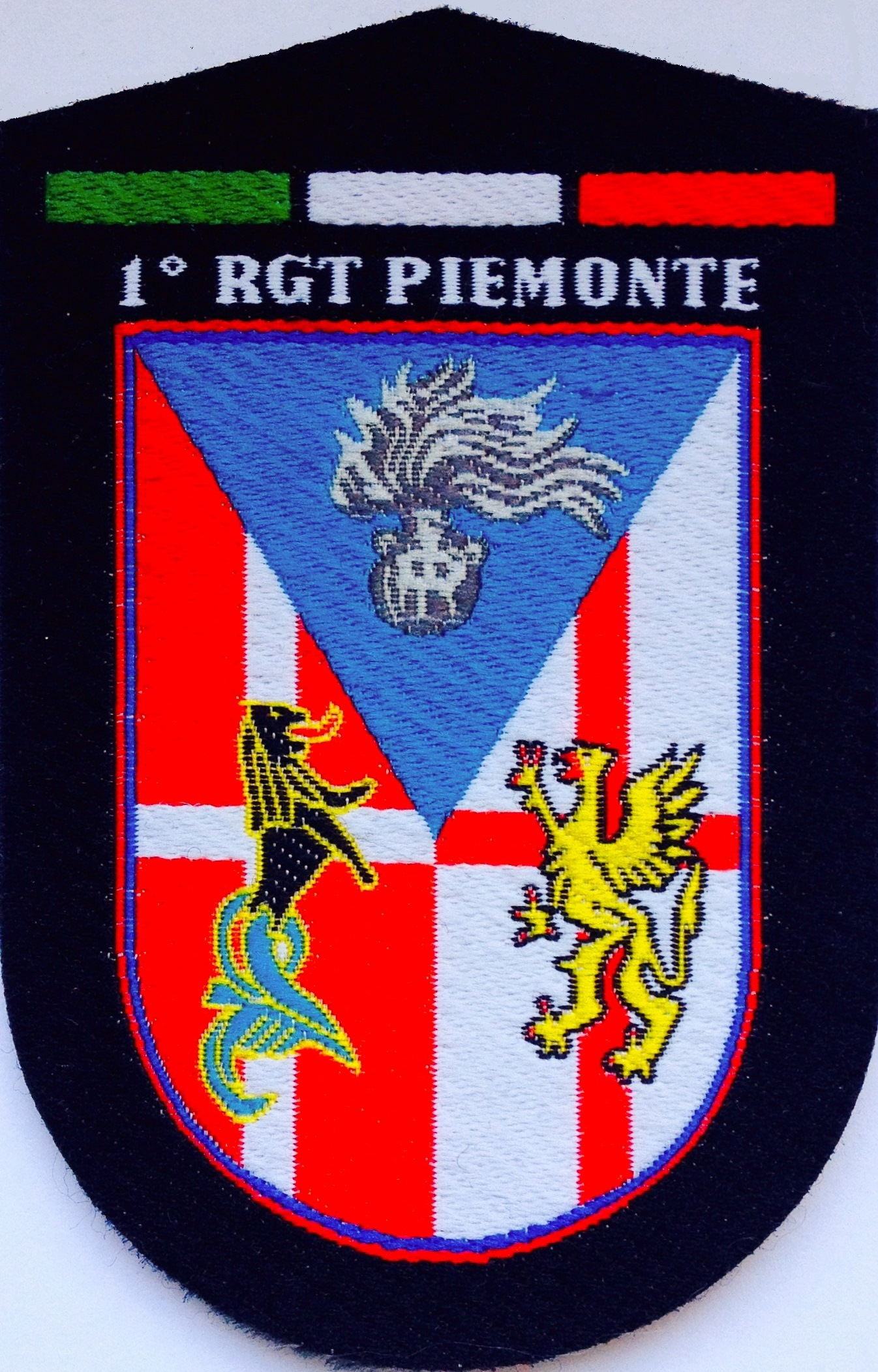 Omerale per tuta da OP con logo di reparto del 1° Reggimento Carabinieri Piemonte